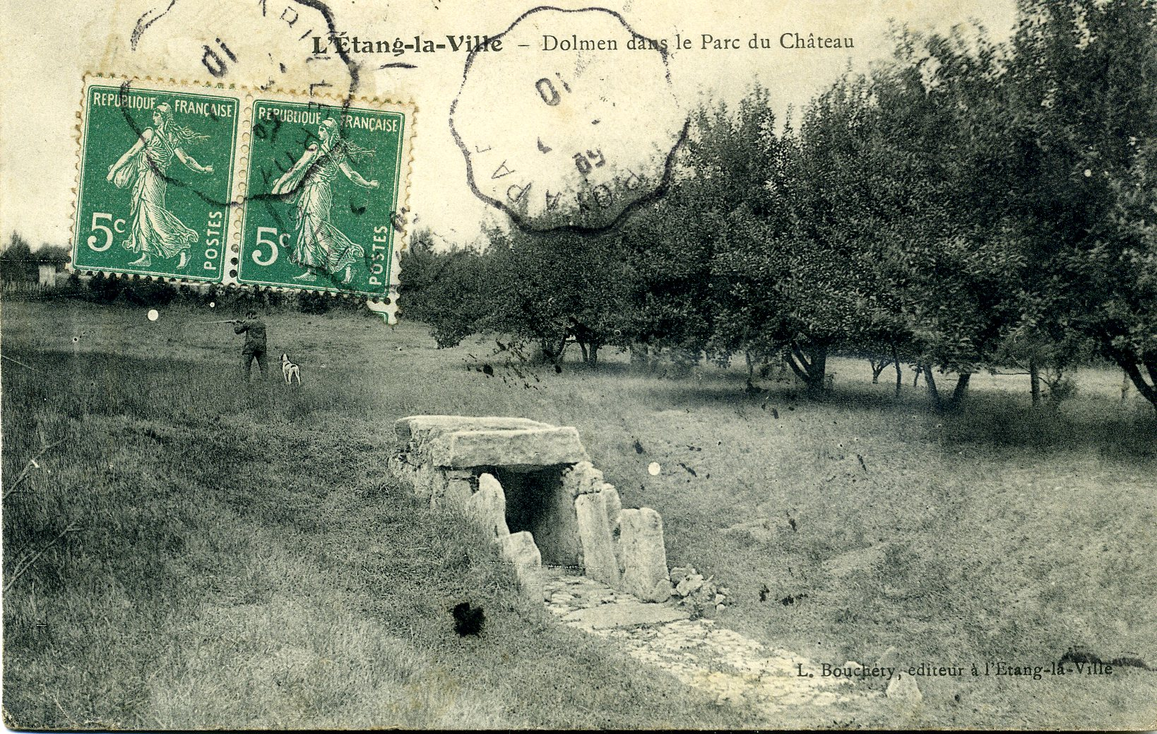 Dolmen à l'Étang-la-Ville - Yvelines (France)